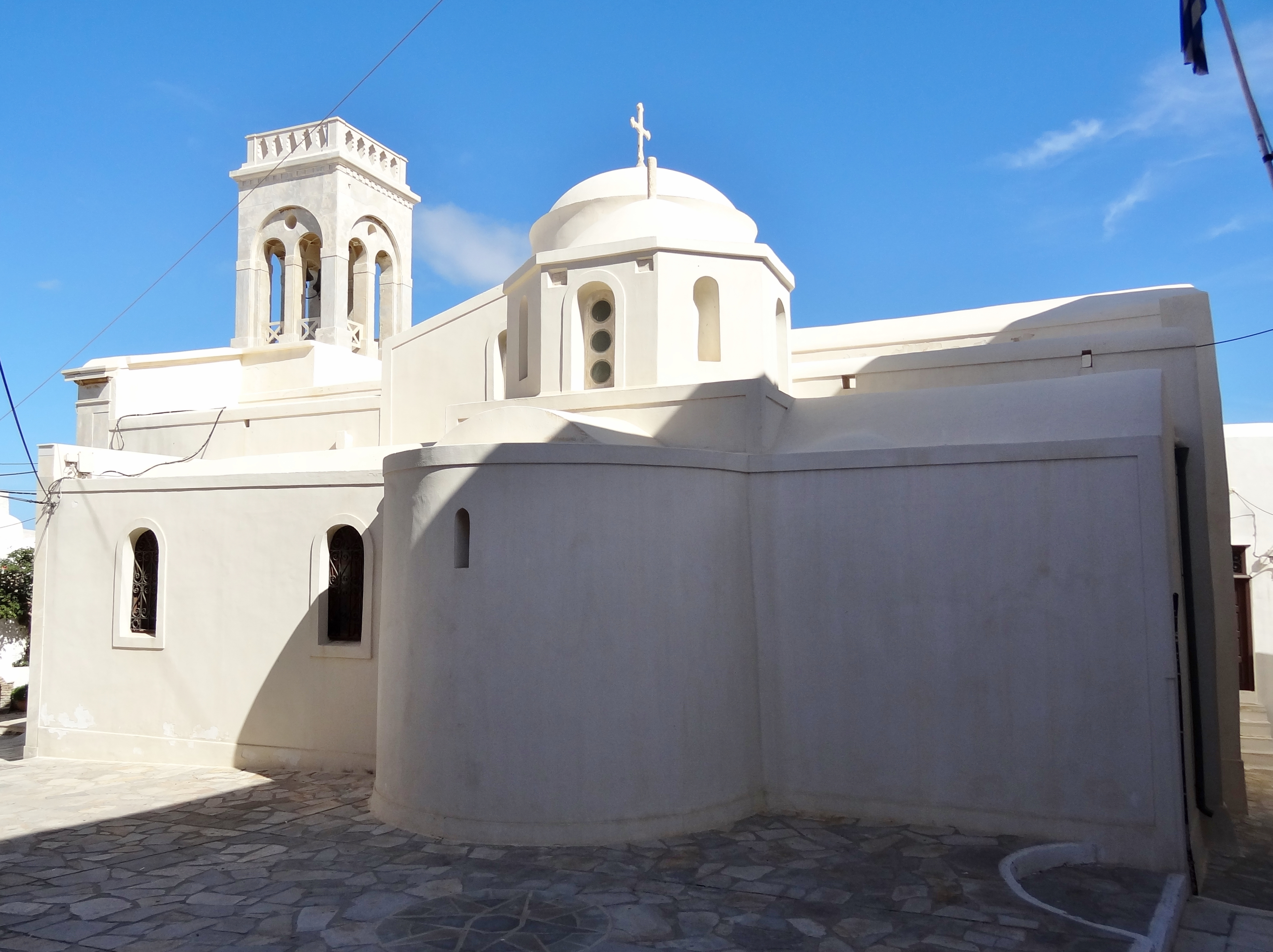 Katholische Kirche in Chora, Naxos, Kykladen, Griechenland